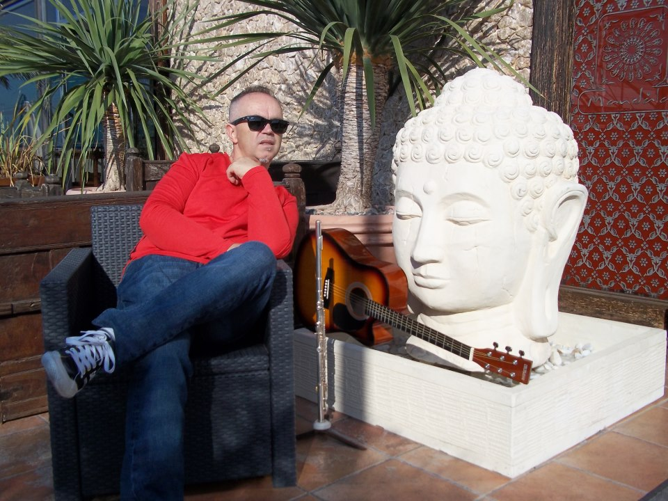 Цане Николовски